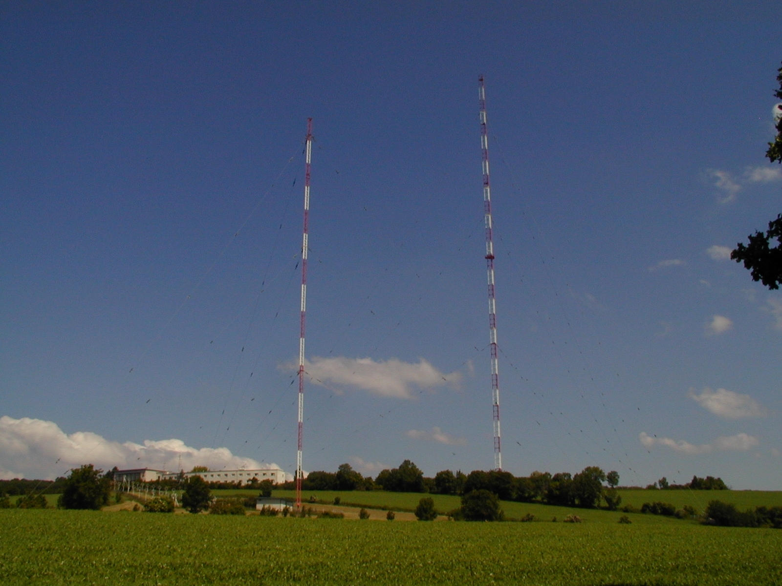 Sendeanlage Bisamberg bei Wien. Von links nach rechts: Sendegebäude, Südmast (120m), Nordmast (265m).